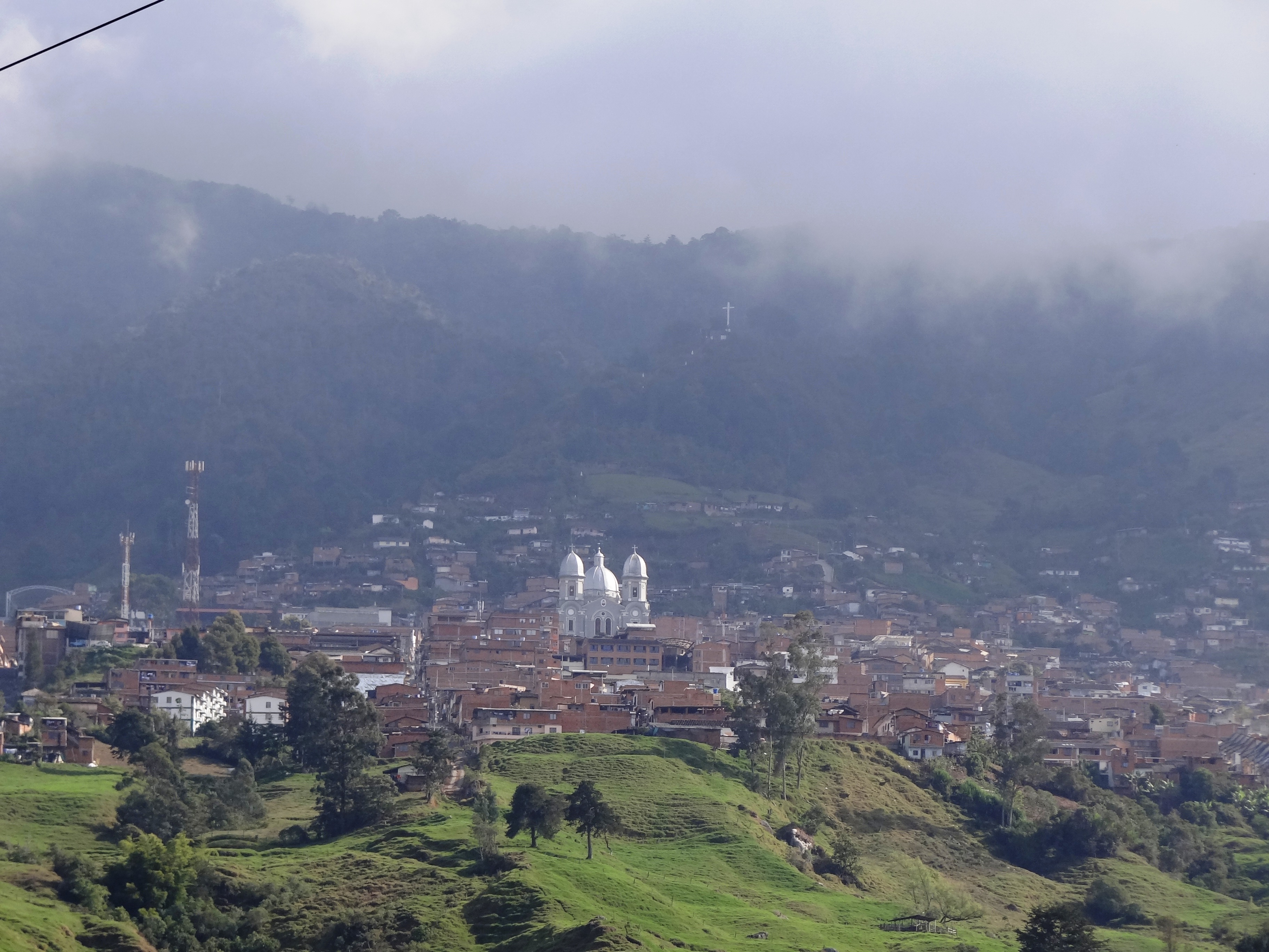 Vista del centro, municipio de Yarumal, departamento de Antioquia, Colombia